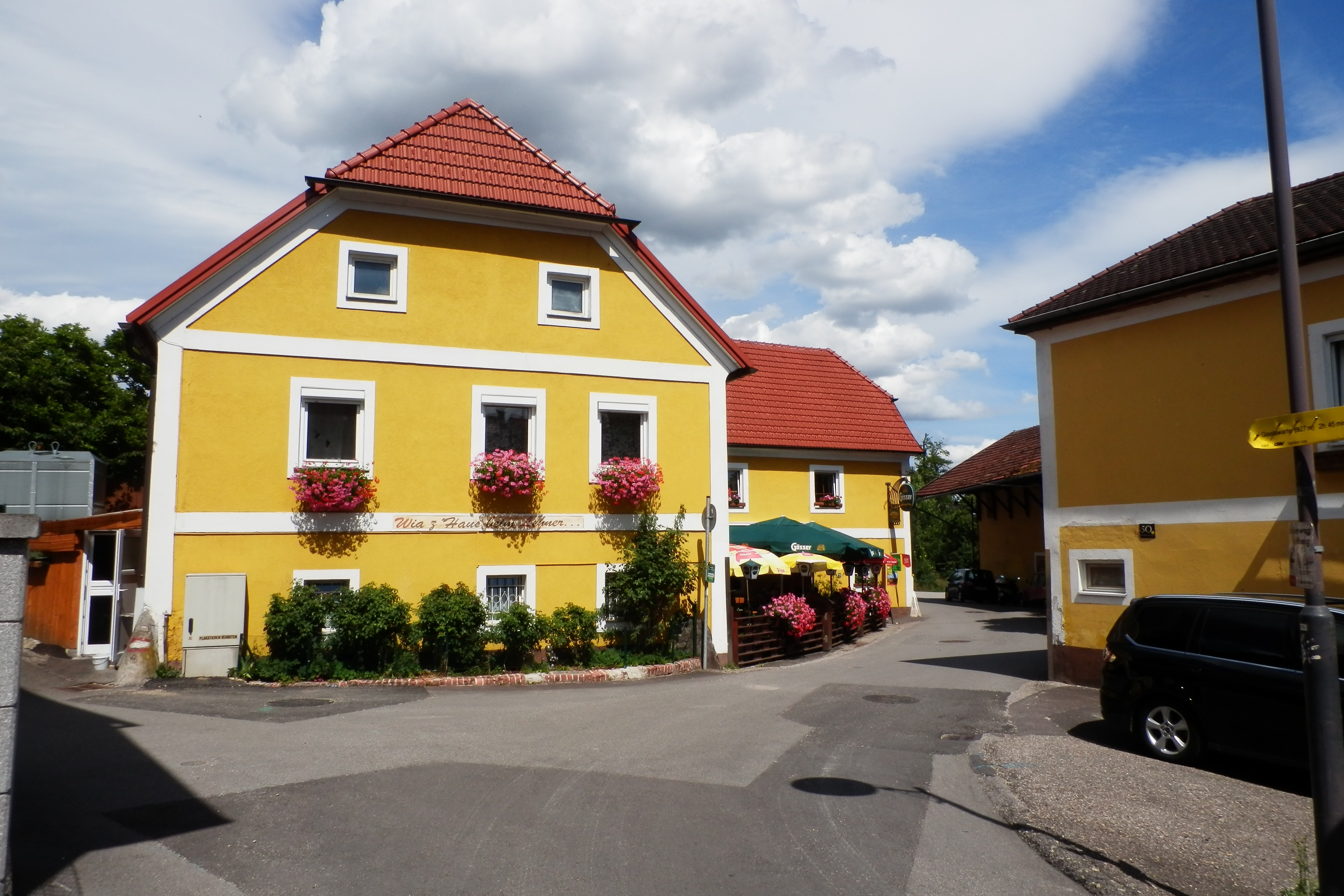 Gasthaus Lehner im Bachl, Linz, Harbacher Straße